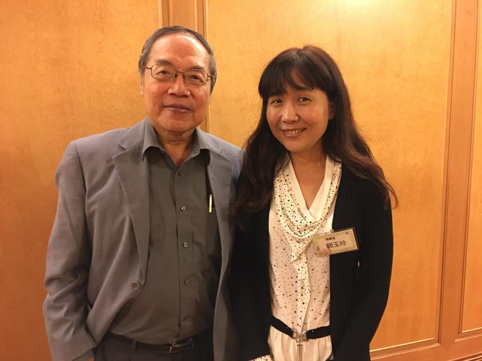 陳芳明與顧玉玲